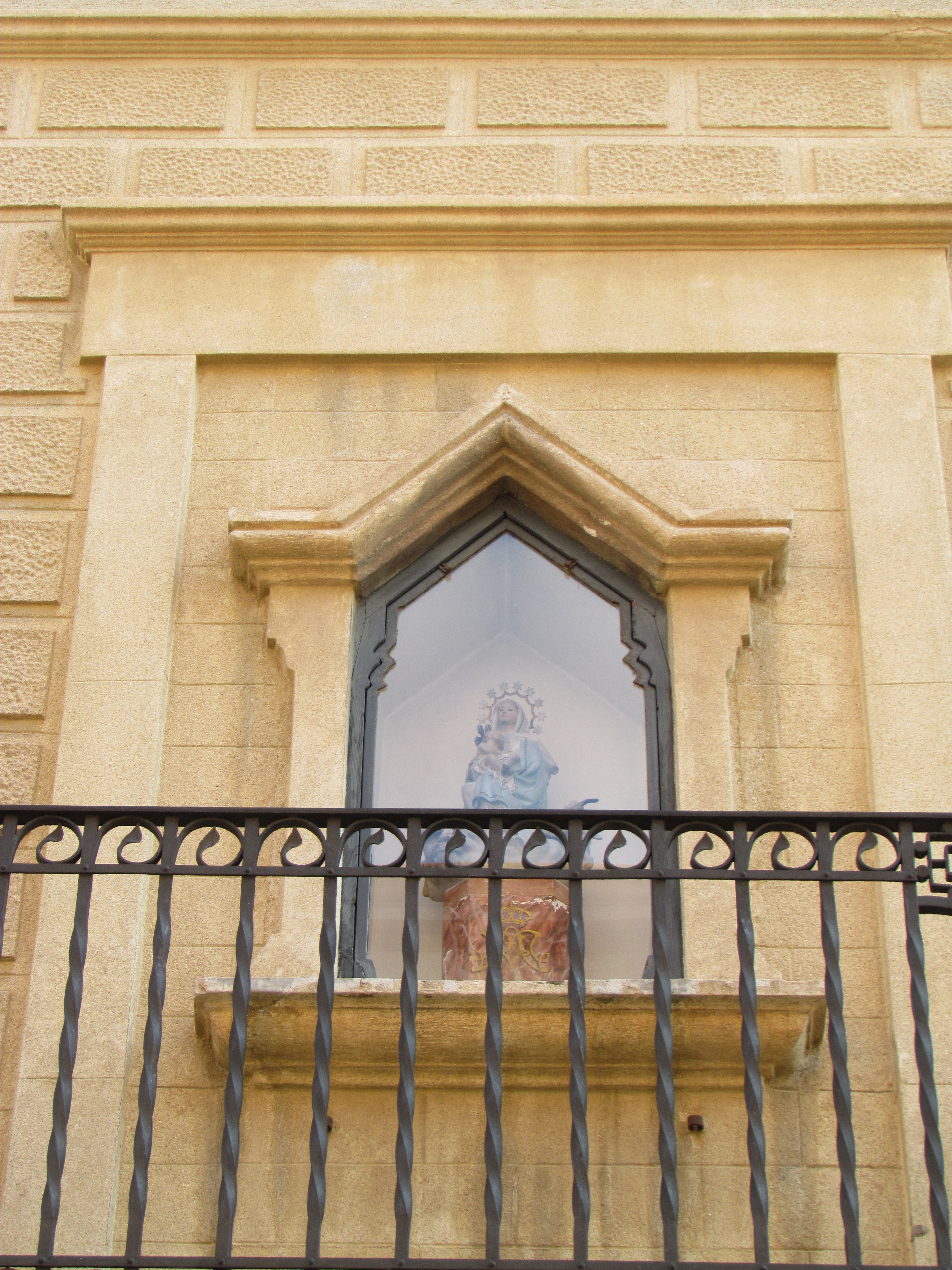 Capelleta de la Mare de Déu dels Àngels (Mataró)